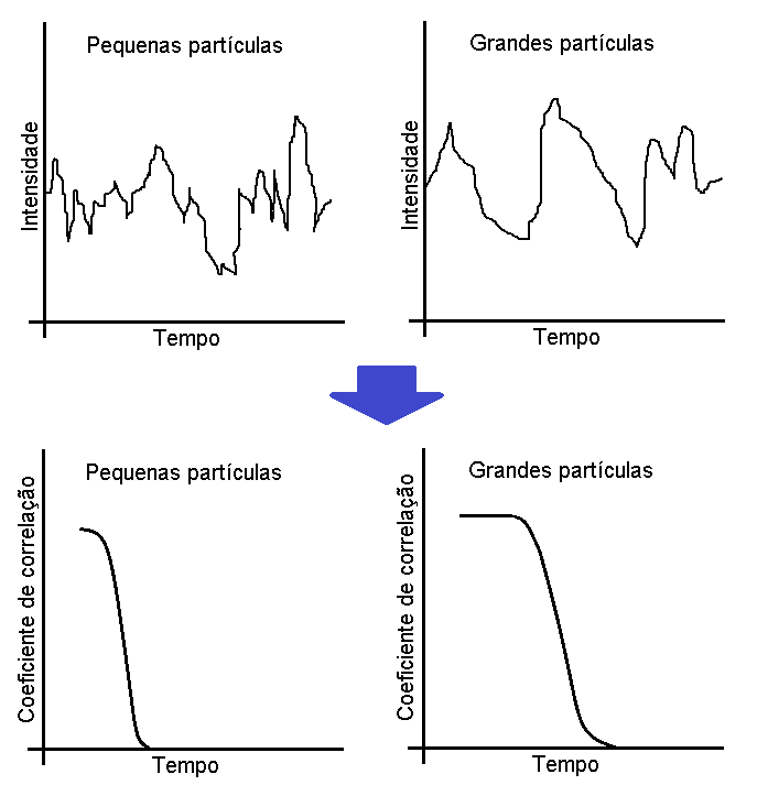 Correlacão da intensidade